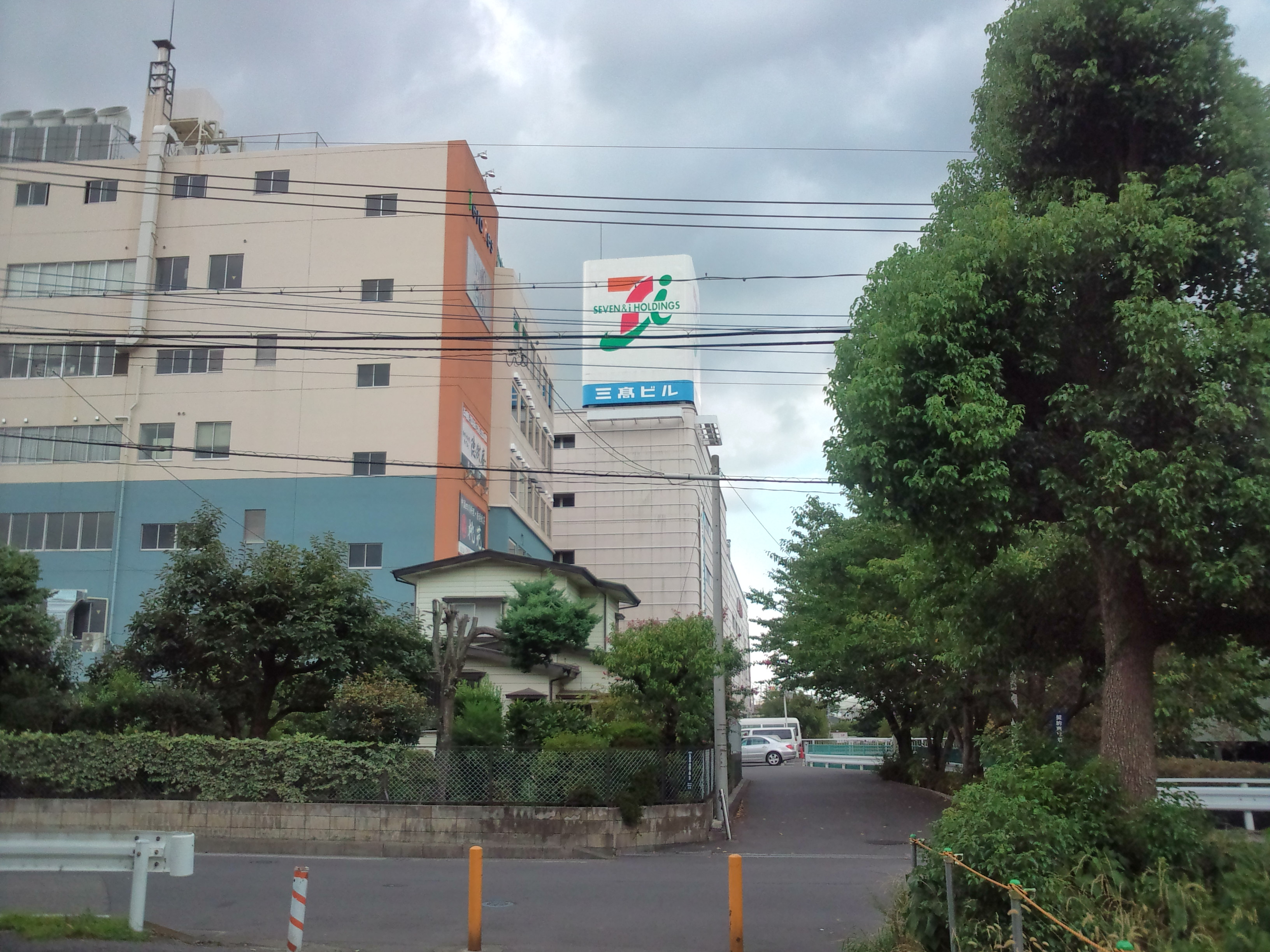 三高ビル（第1ビルと第2ビル）